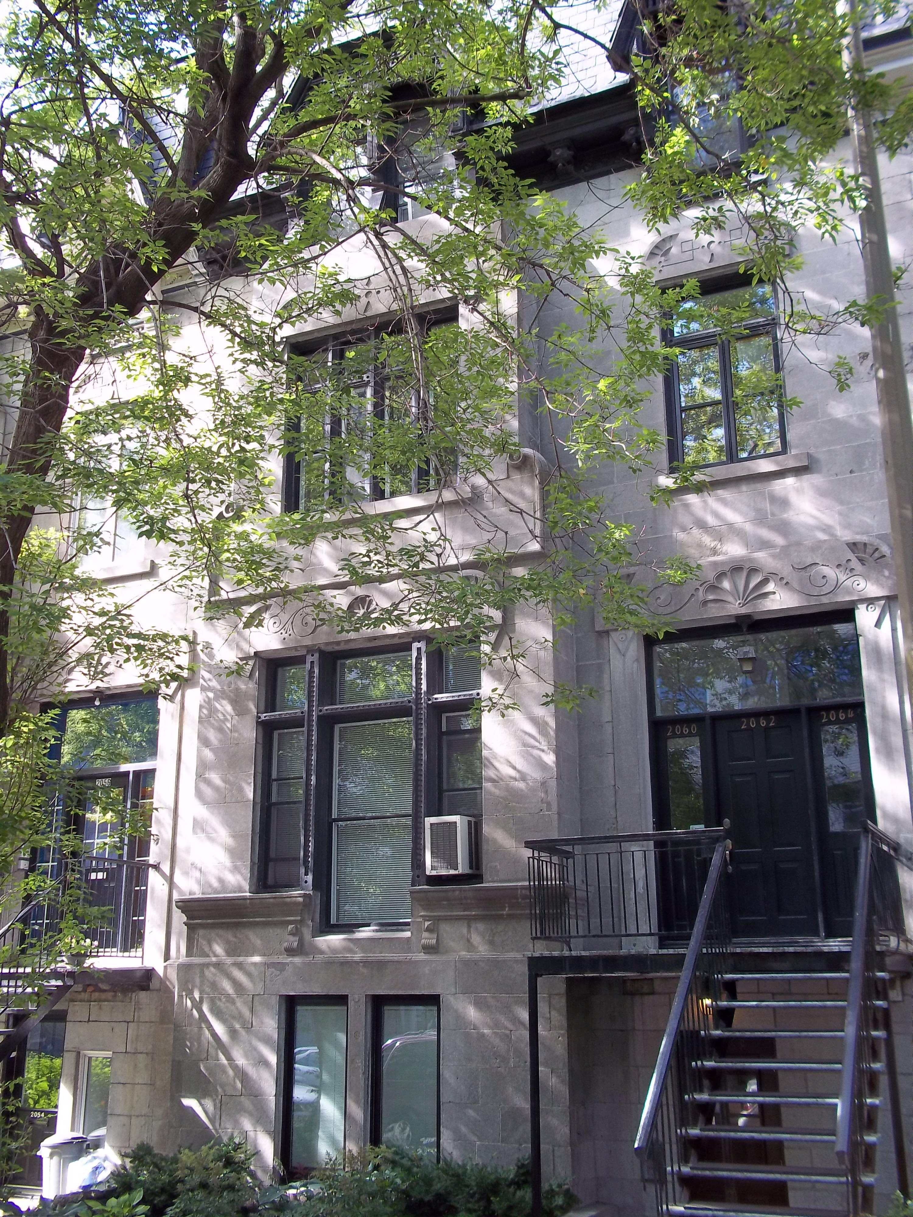 Maisons Janvier-Arthur-Vaillancourt, 2058-2064, rue Jeanne-Mance, Montréal